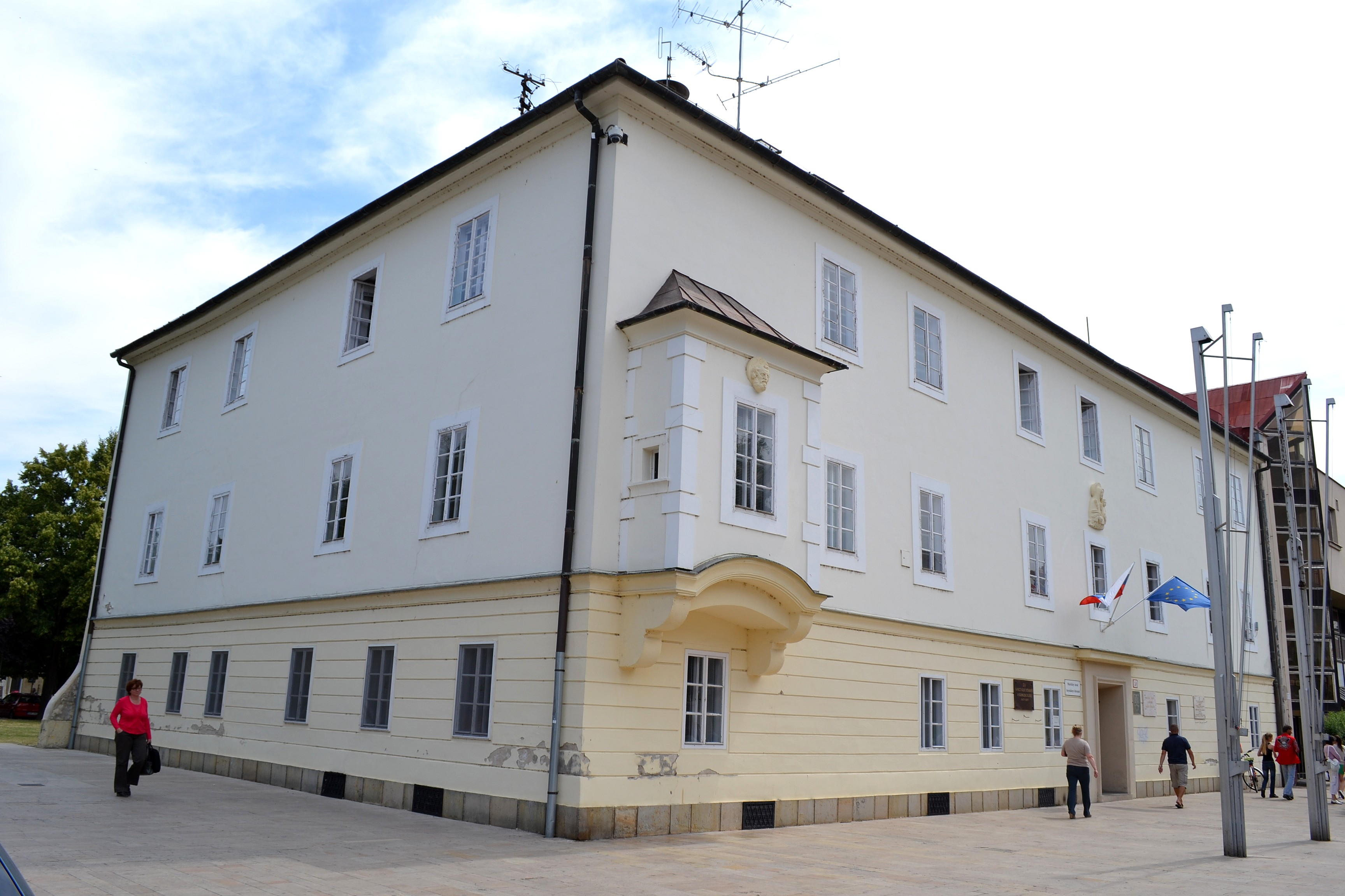 Budova renesančnej radnice v Šamoríne; celkový pohľad